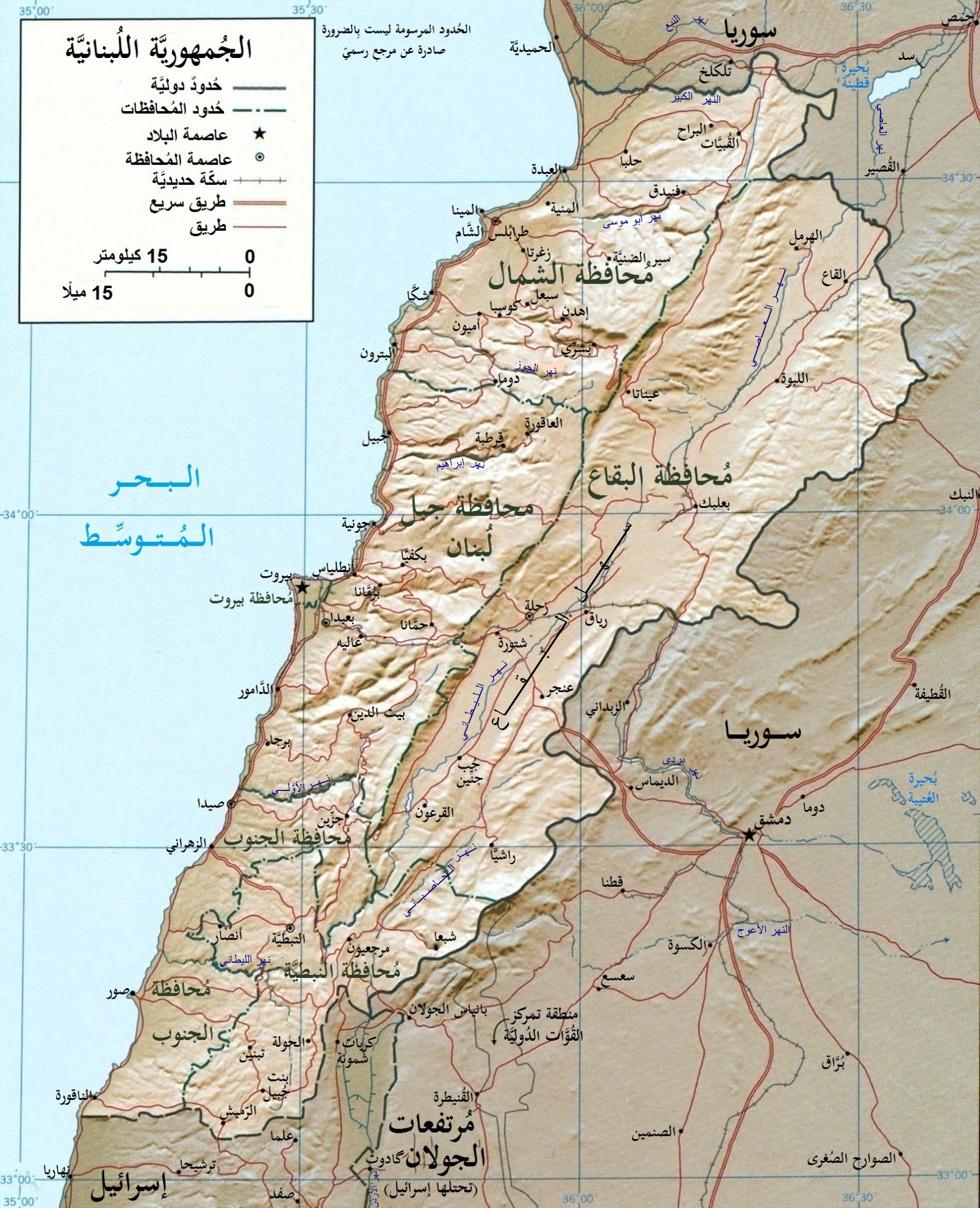 خارطة تُظهر التقسيمات الإداريَّة لِلجُمهُوريَّة اللُبنانيَّة وبعض المُدن والمناطق في سوريا وإسرائيل. كما تظهر أسماء أبرز المُدن والبلدات اللُبنانيَّة، إلى جانب الأنهار الرئيسيَّة وشبكات الطُرق والسكك الحديديَّة.